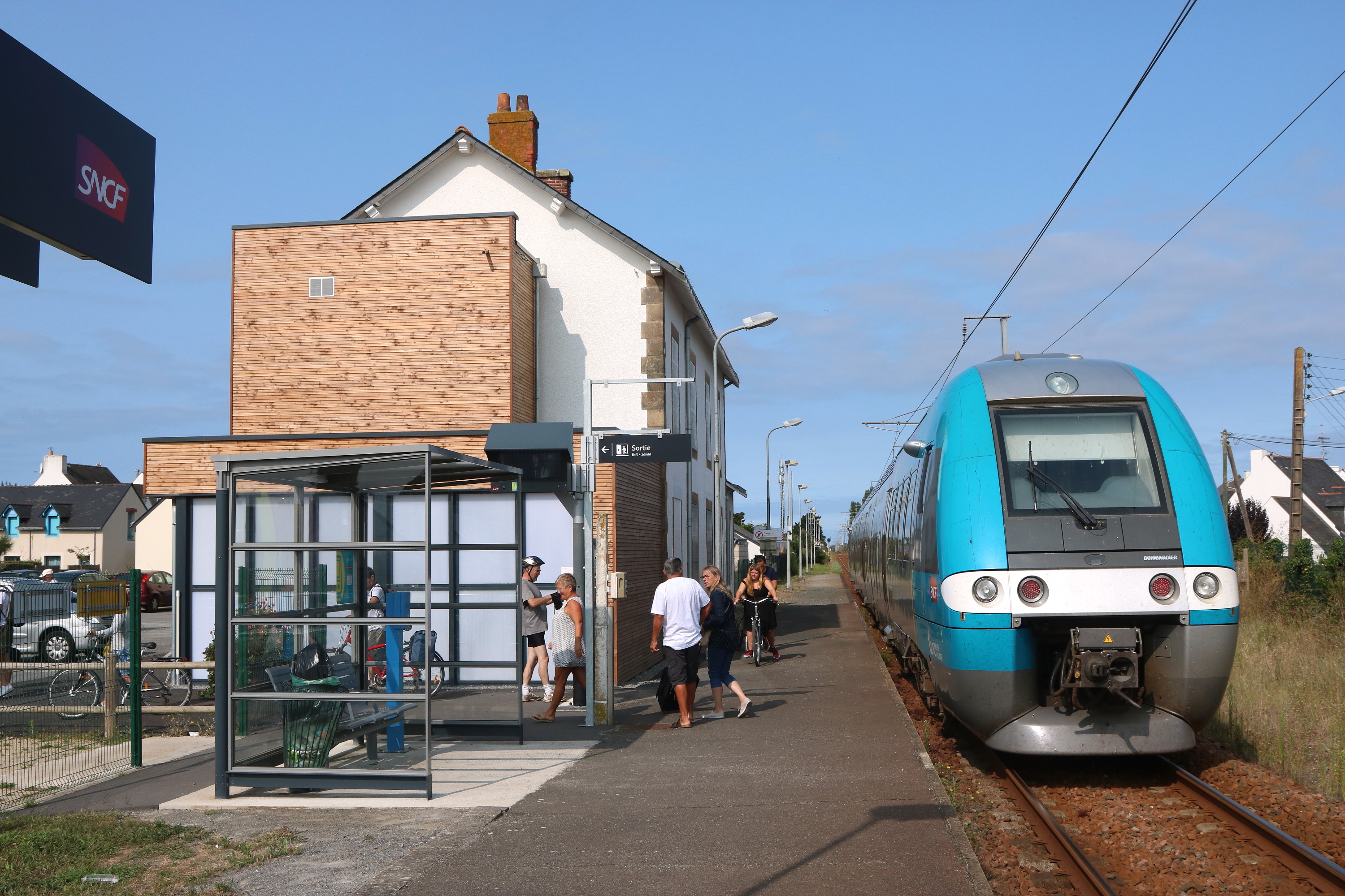 Un XGC (X 76500) assurant le TER 858061 (Nantes - Le Croisic) entièrement sous caténaire, repart de la gare de Batz-sur-Mer, avec un léger retard.